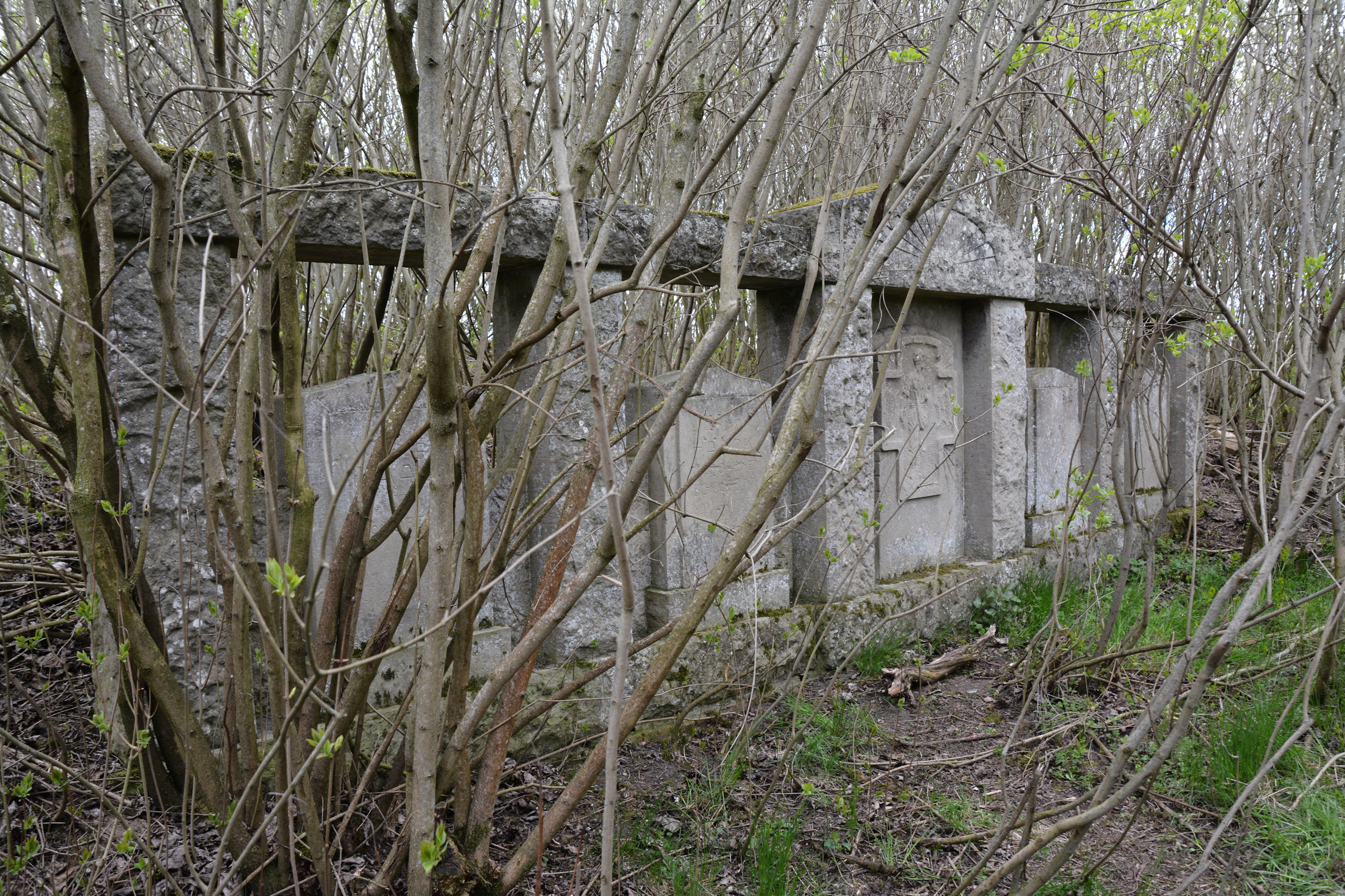 Czernice (gmina Pyrzyce)